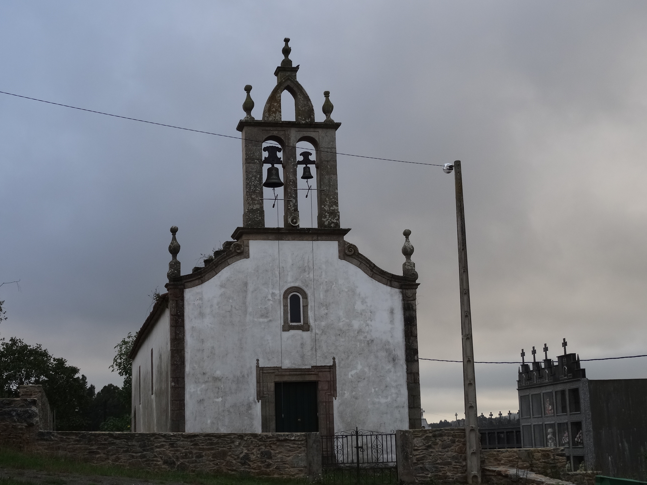 Igrexa de Belmil no concello de Santiso, provincia da Coruña.